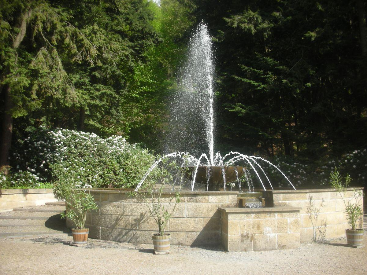 Bad Elster, Springbrunnen in den Parkanlagen